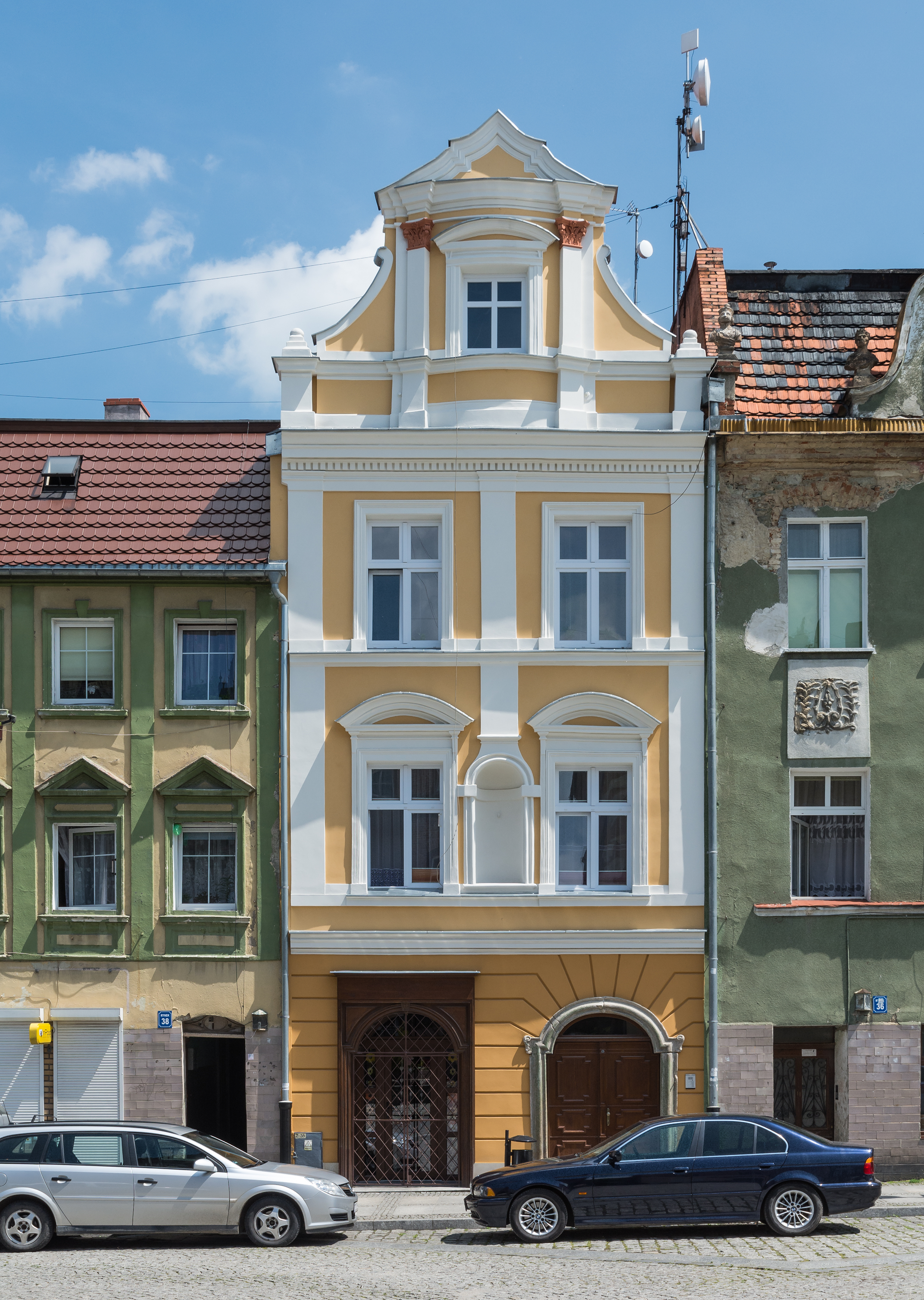 Niemcza, Rynek 37 - dom (kamienica mieszczańska), XVI, 1730-1740